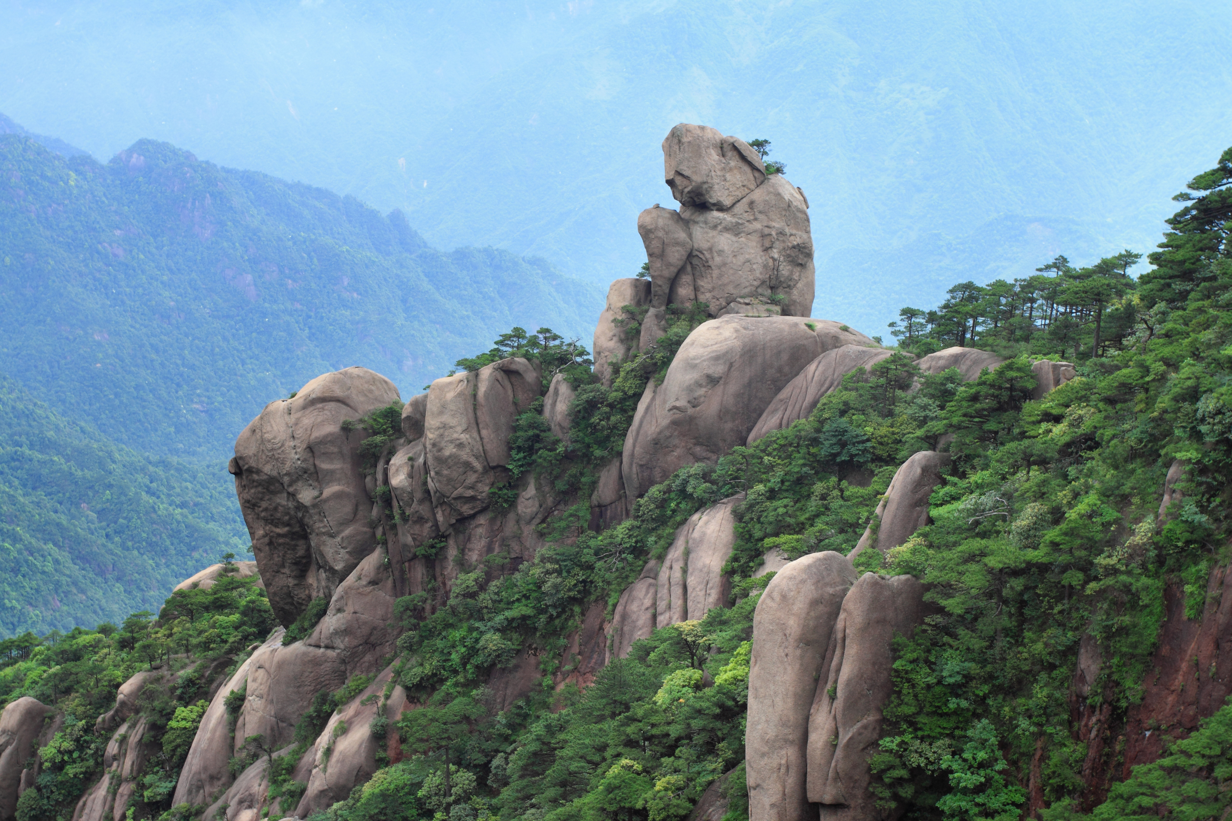 三清山 ——猴王献宝